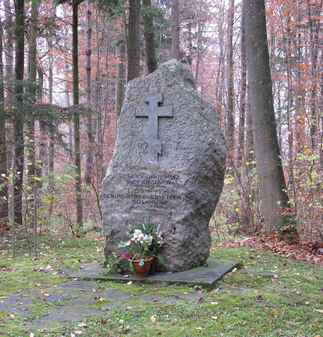 Памятник установленный «Суворовским чудо-богатырям», похороненым здесь в 1799 году.